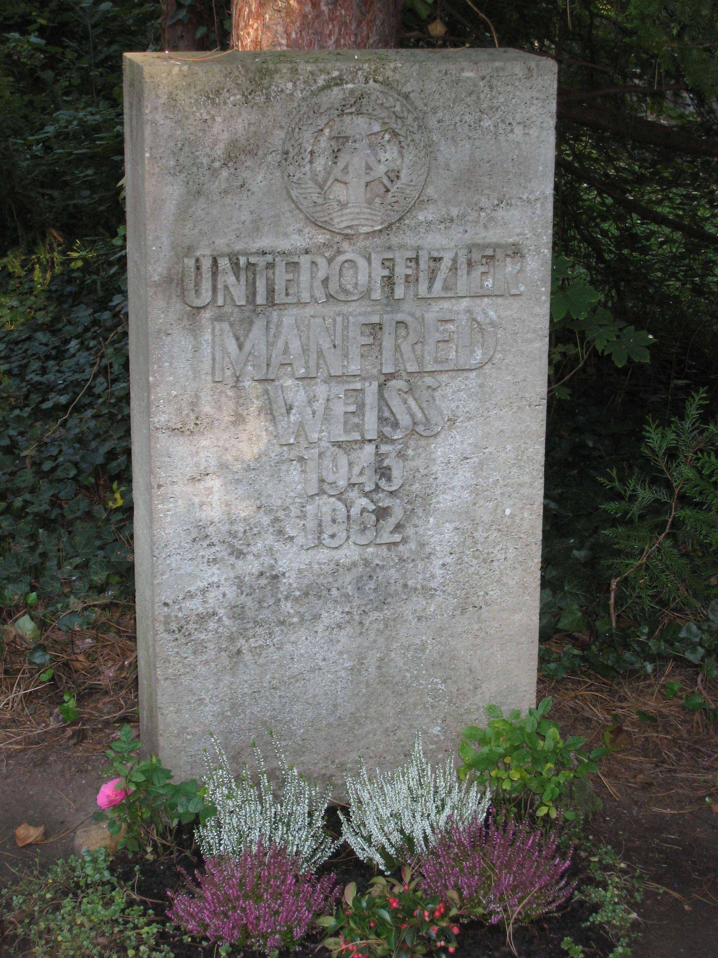 Ehrengrab des DDR-Grenzsoldaten Manfred Weiss am Erfurter Hauptfriedhof